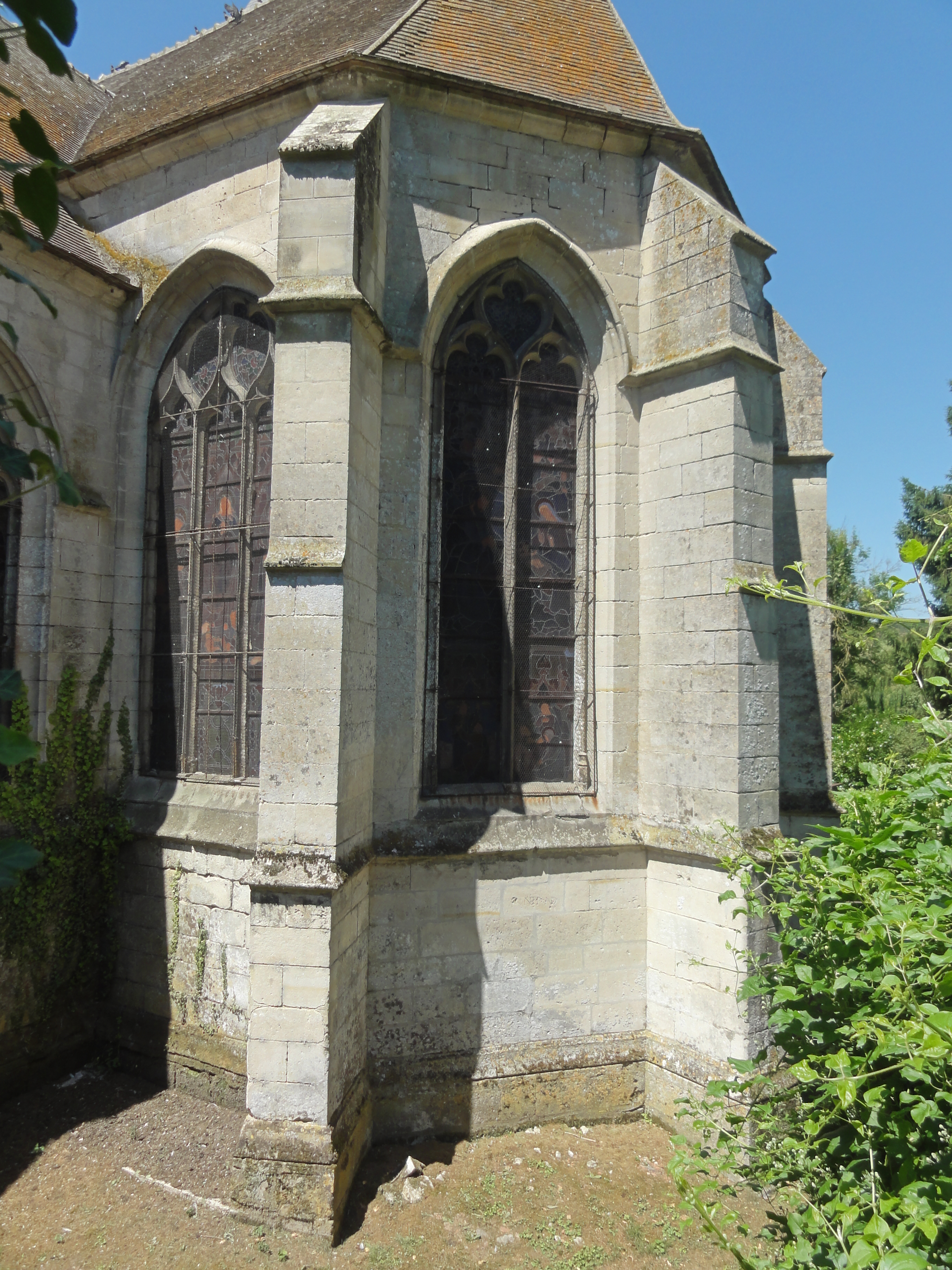 Voir titre.